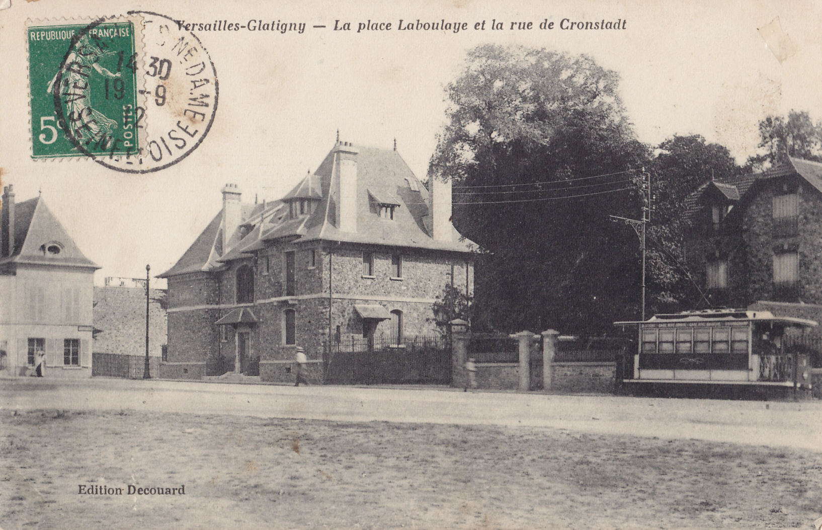 Carte postale ancienne éditée par Decouard :VERSAILLES-GLATIGNY - La Place Laboulaye et la rue de Cronstadt